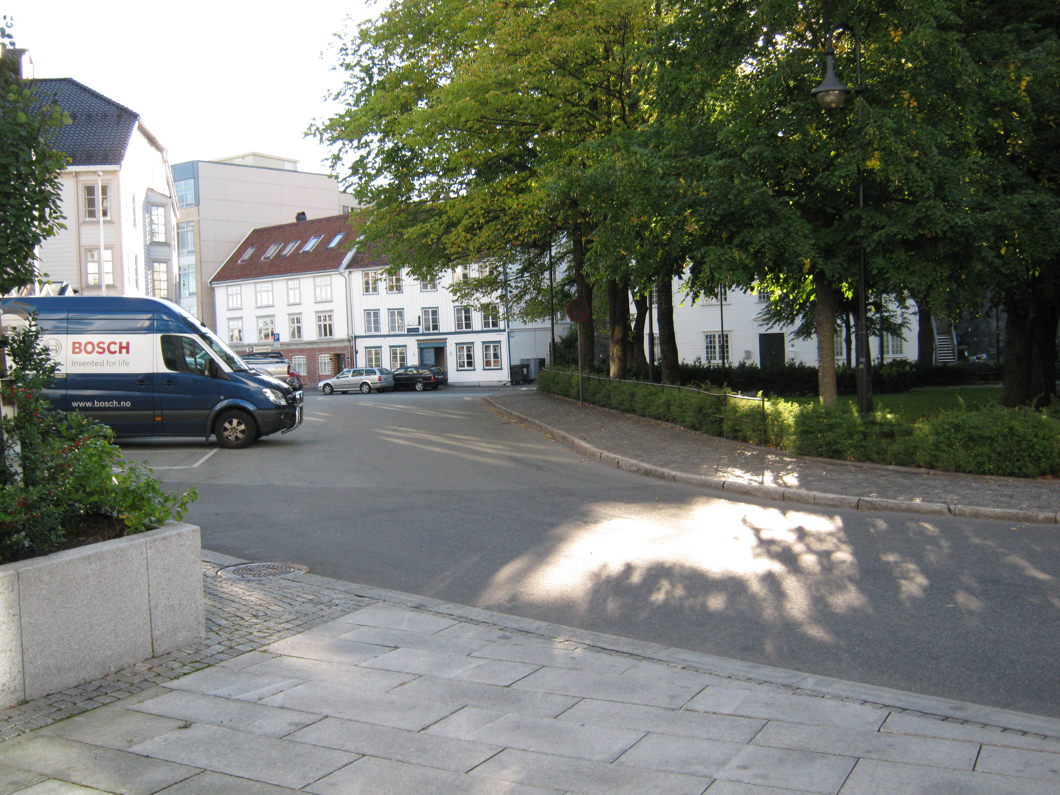 Teaterplassen i Arendal